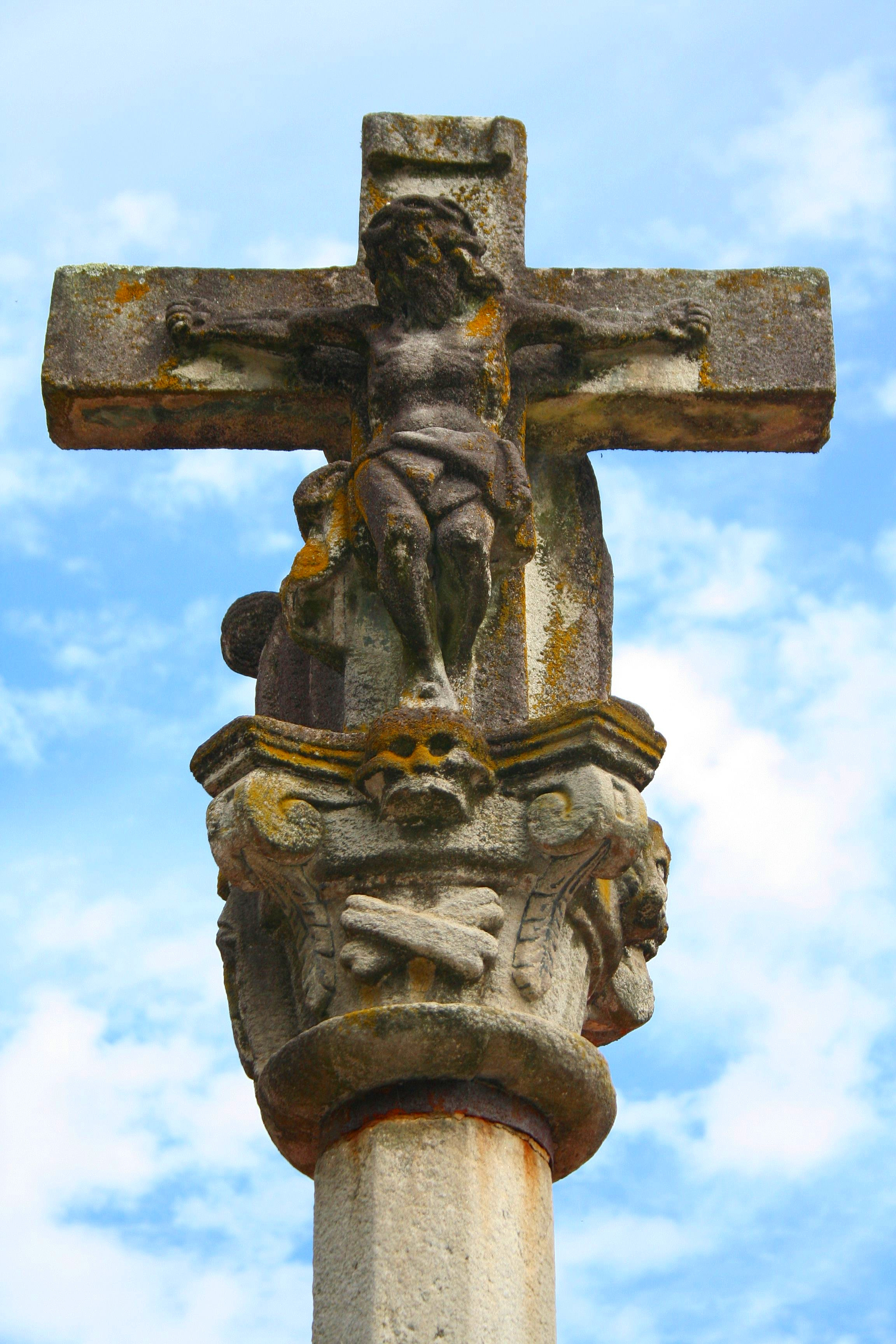 Jesucristo crucificado en Combarro, Pontevedra, Galicia.